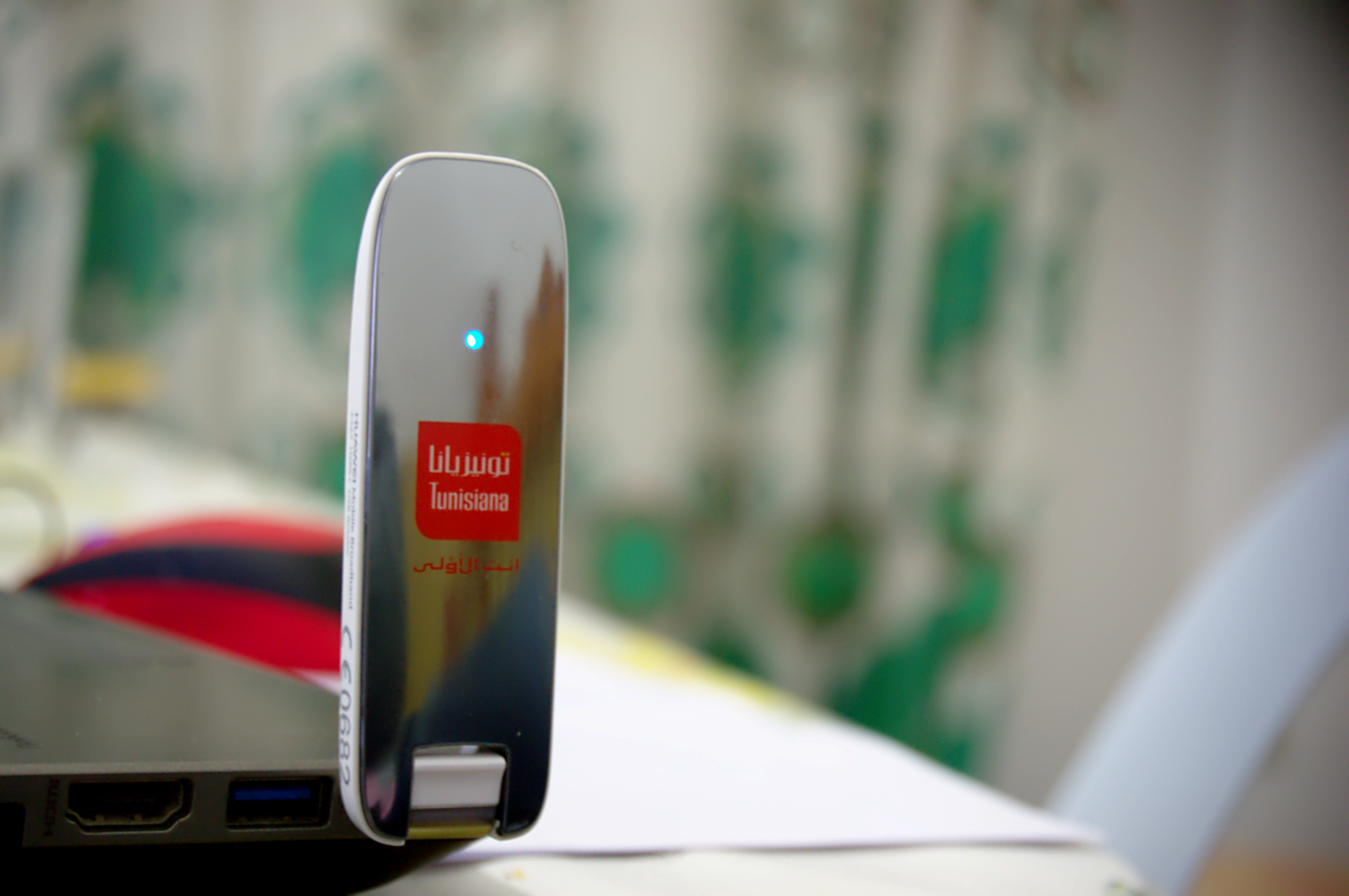 Clé 3G du fournisseur de services télécoms en Tunisie Tunisiana, de marque Huawei E367 This photograph was taken with a Nikon D3100